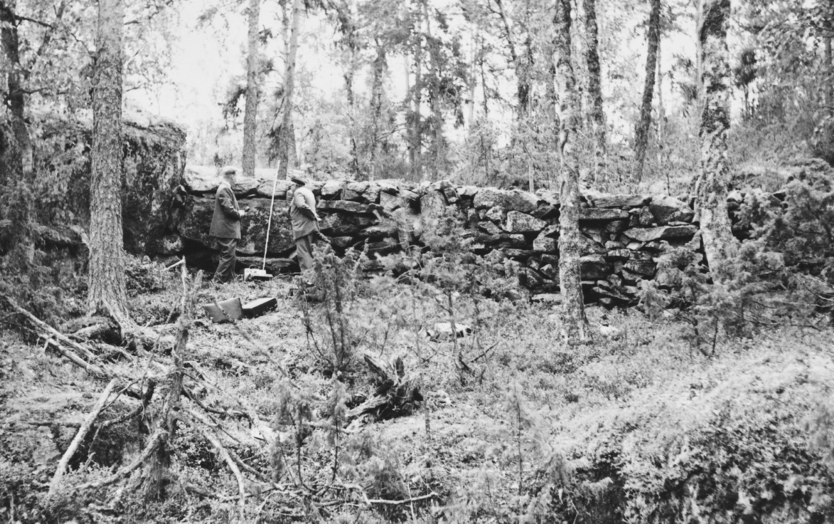 Otralan muinaislinnan vallia kuvattuna vuonna 1955.